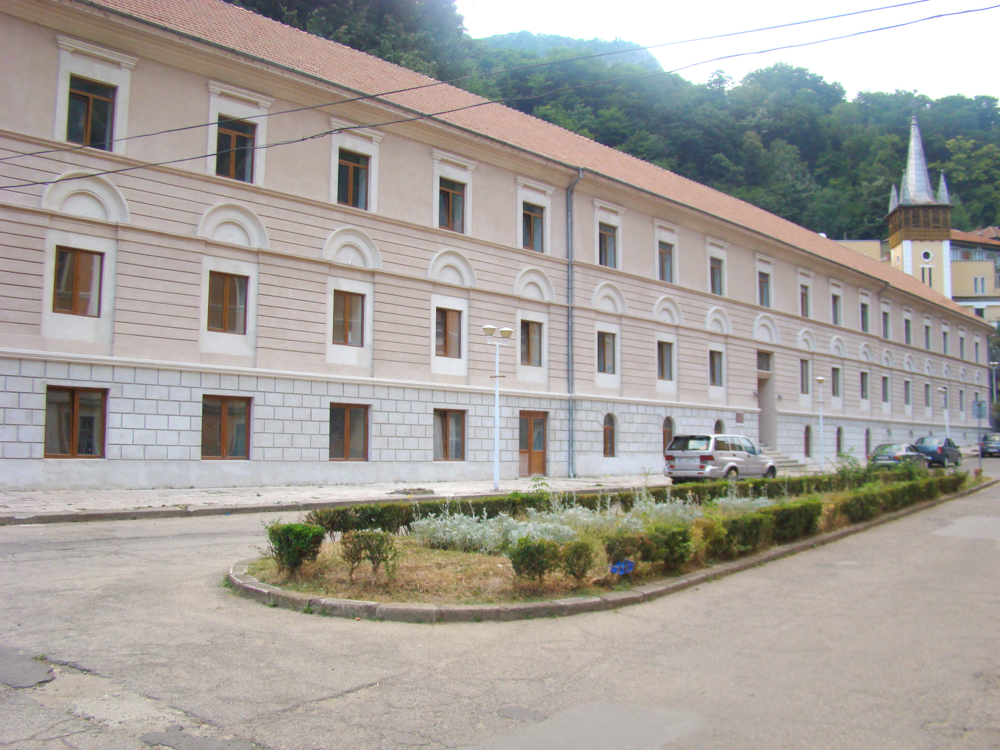 Fostul „Sanatoriu ofițeresc”, oraș Băile Herculane, Piața Hercules 7 02